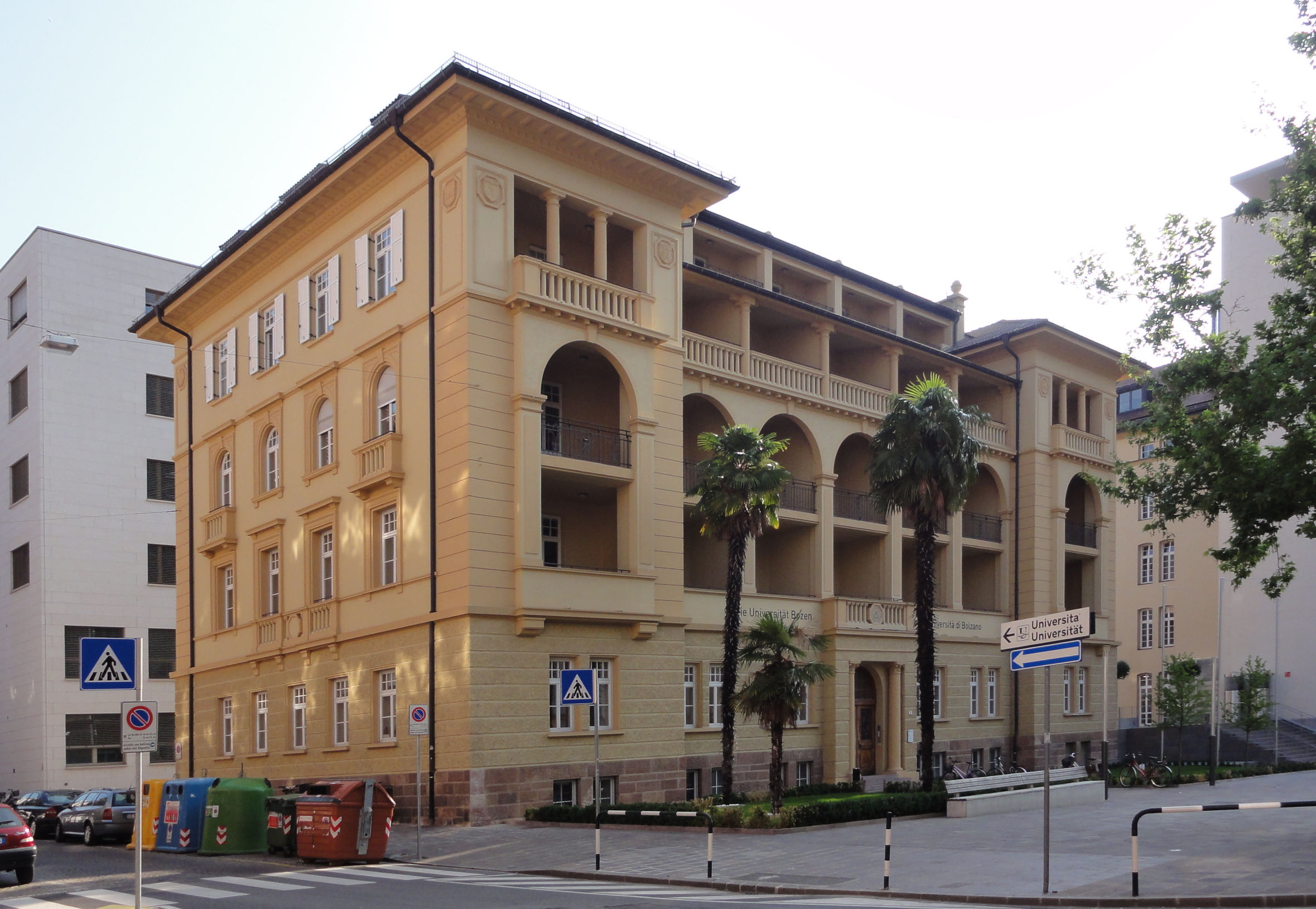 Bozen-Bolzano — Universitätsgebäude